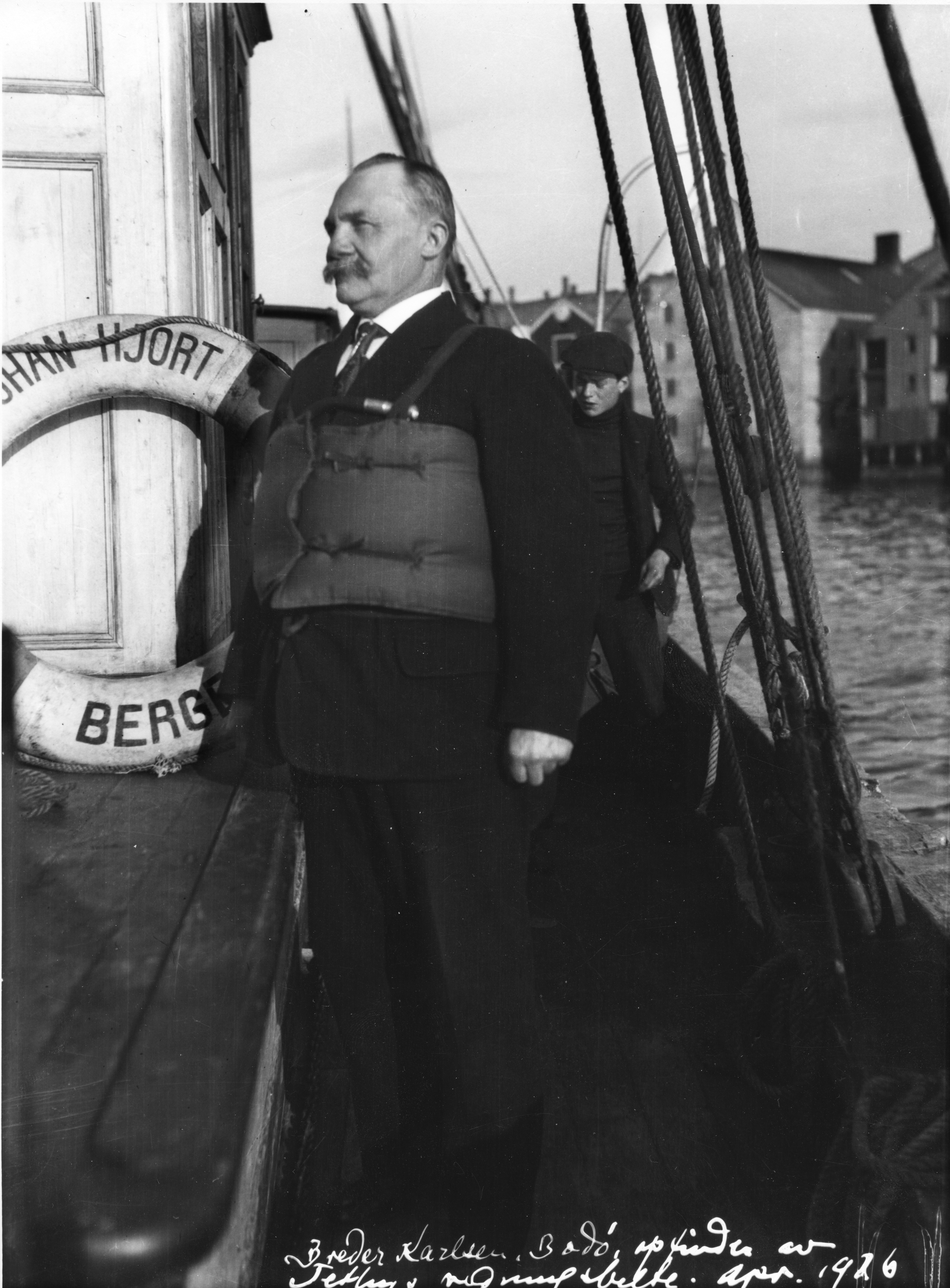 Breder Carlsen om bord på forskningsfartøyet Johan Hjort 1926